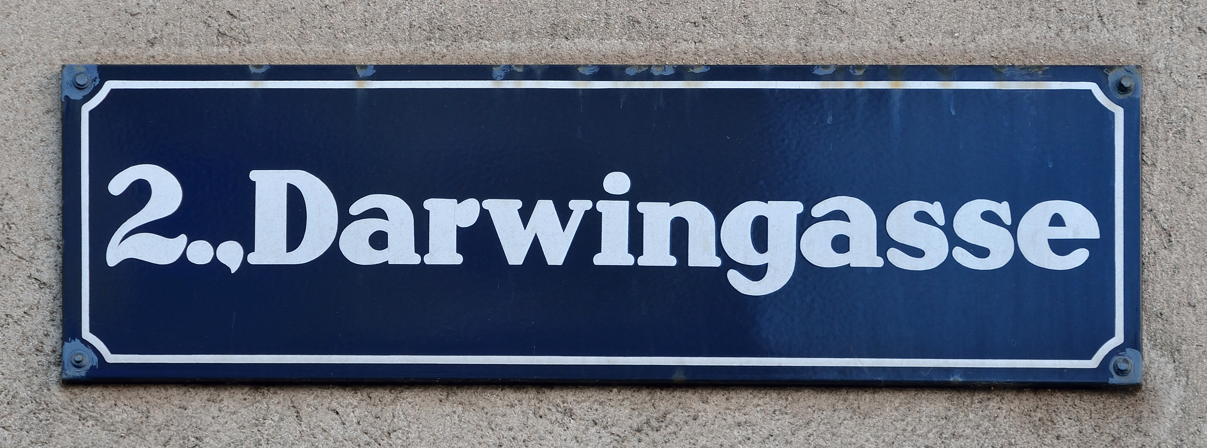 Straßenschild Darwingasse in der Wiener Leopoldstadt.